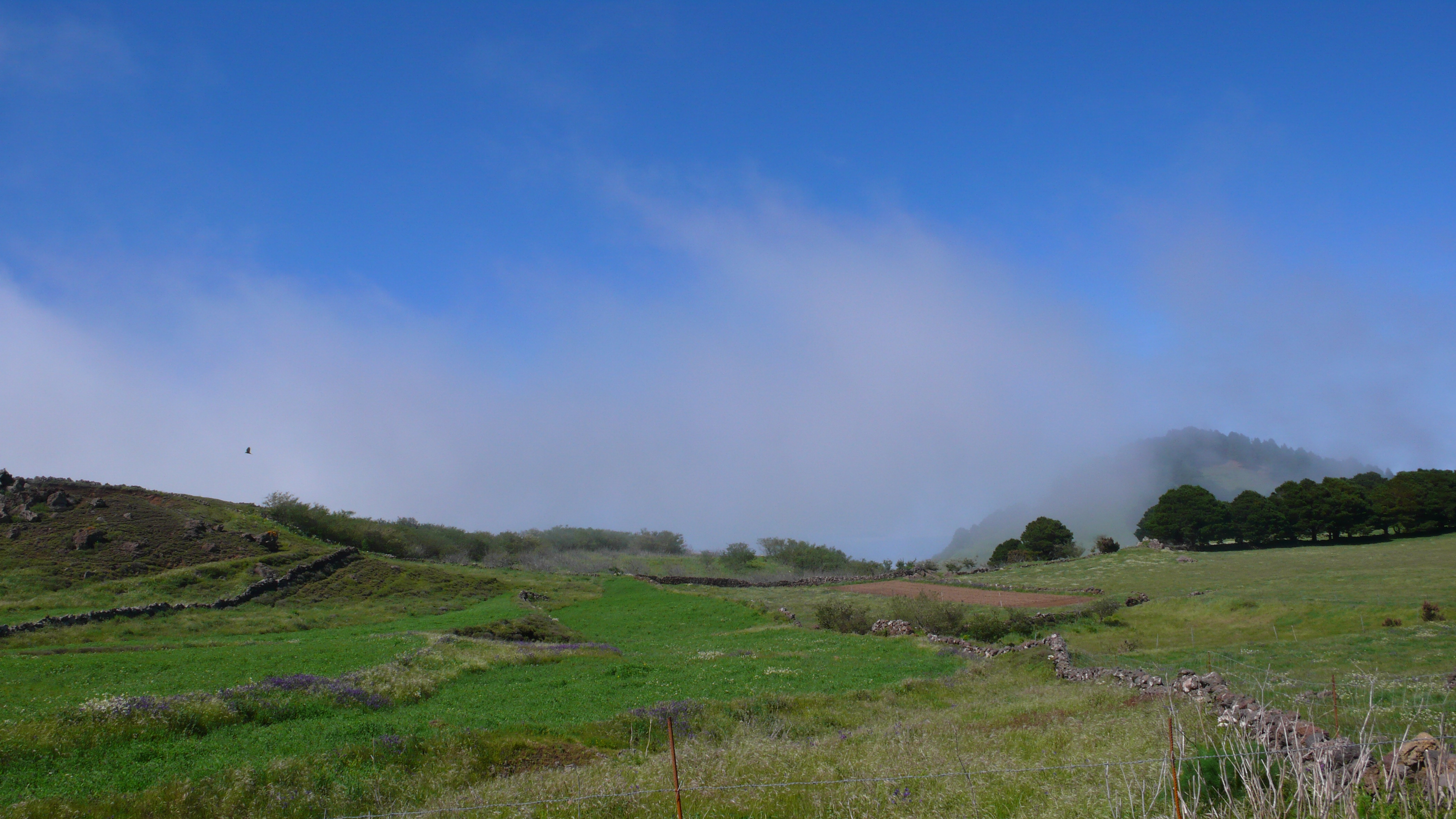 Vista de la Meseta de Nisdafe, en la isla de El Hierro, Islas Canarias.